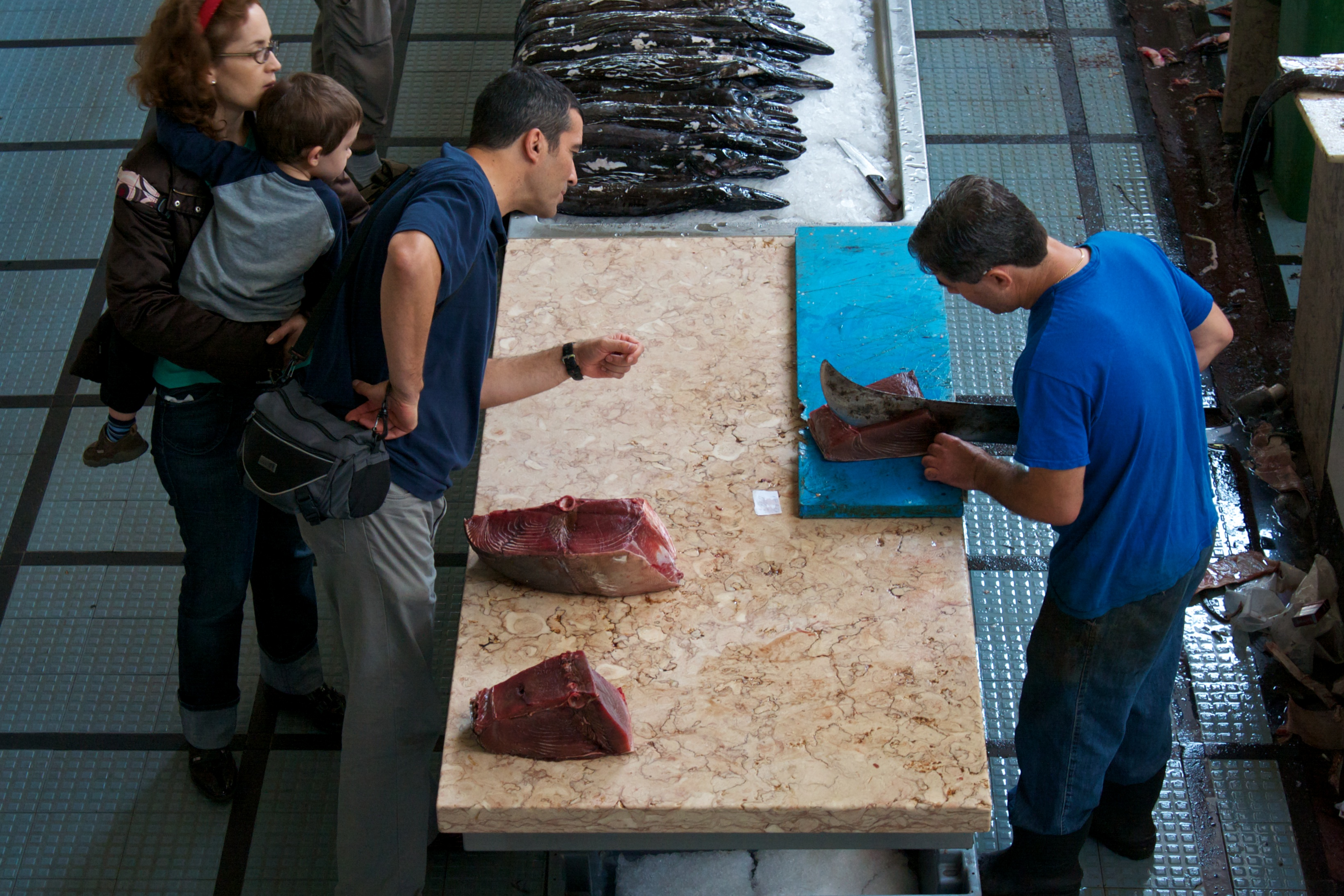 At Mercado dos Lavradores, Funchal